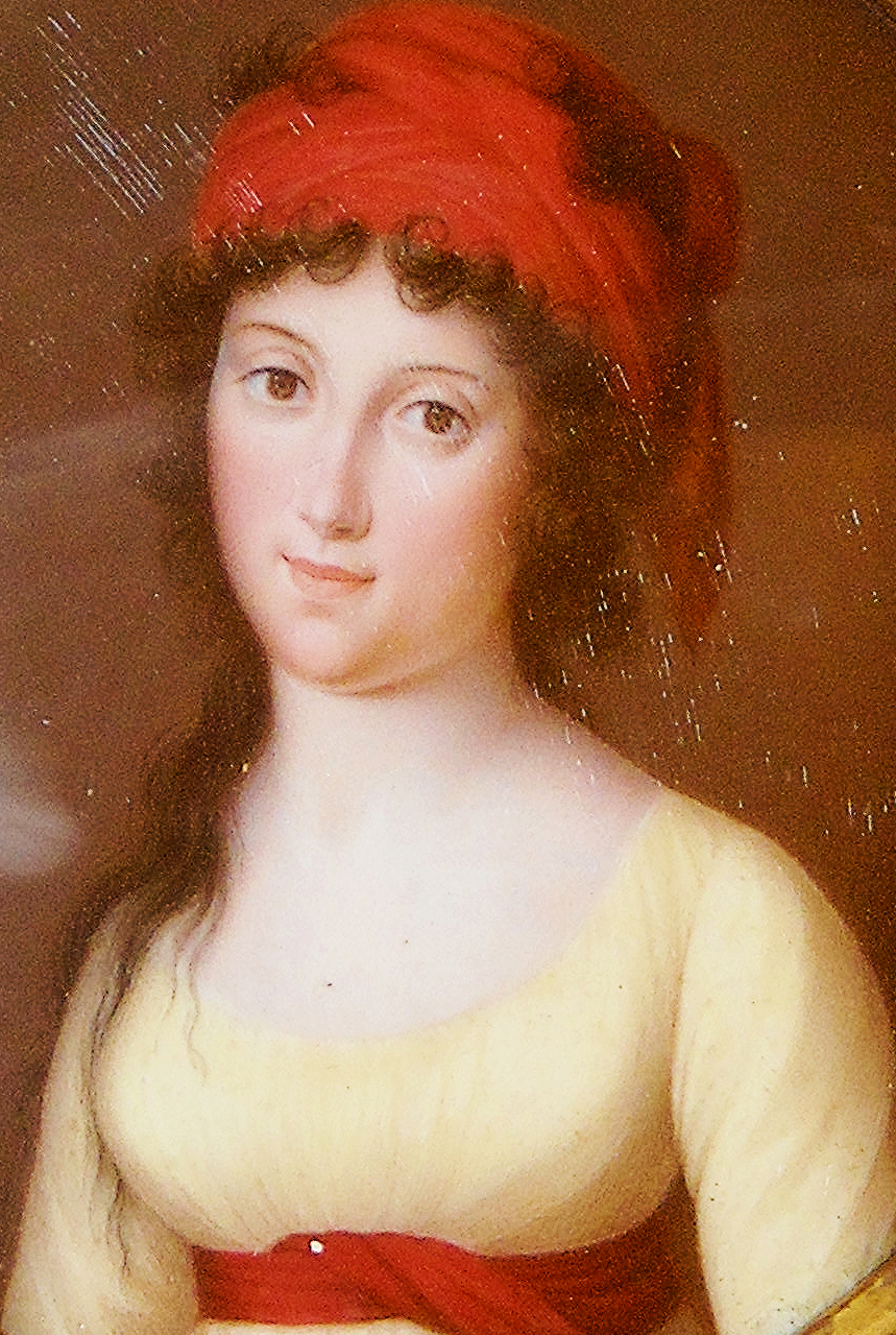 Lucia Migliaccio duschessa di Floridia (Siracusa) ritratta da Luigi Selvaggio. Dipinto collocato a Napoli, presso la Villa Floridiana.